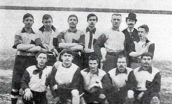 Équipe du Club français, le 26 décembre 1897. Rencontre contre les English Ramblers au vélodrome du Parc des Princes.